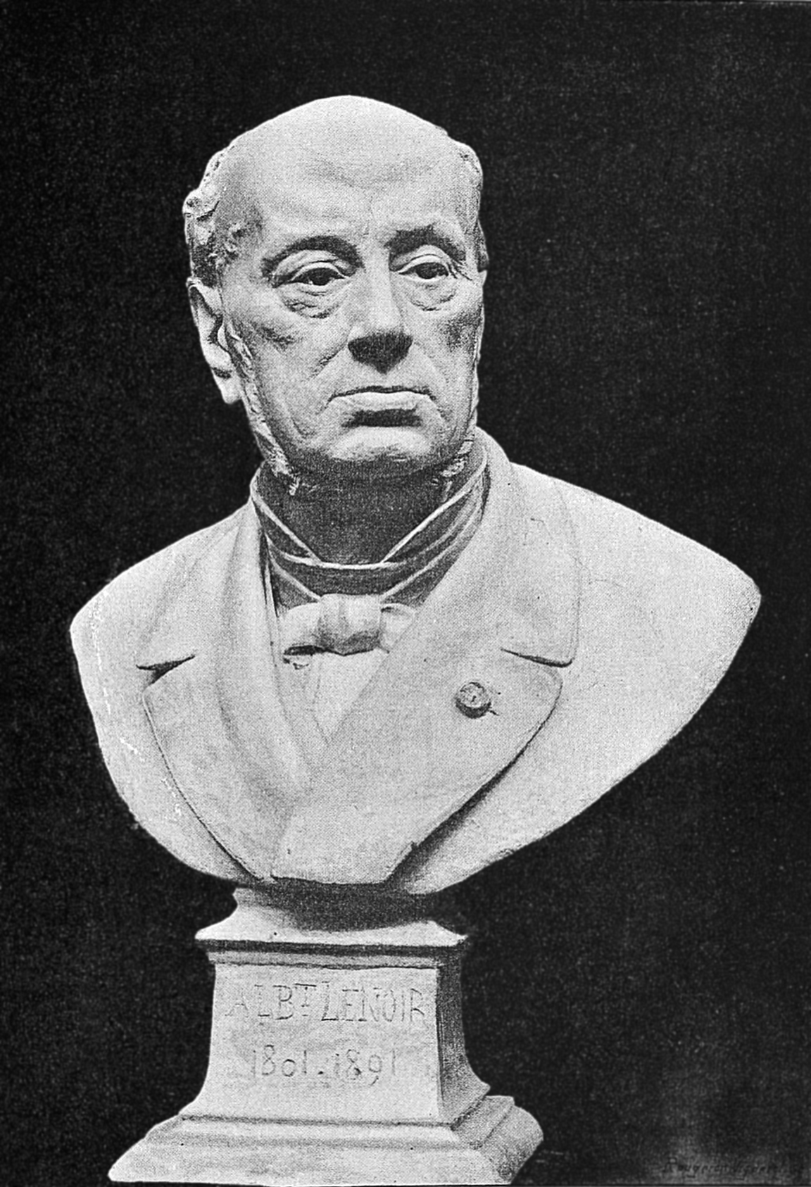 Buste d'Albert Lenoir (1801-1891)